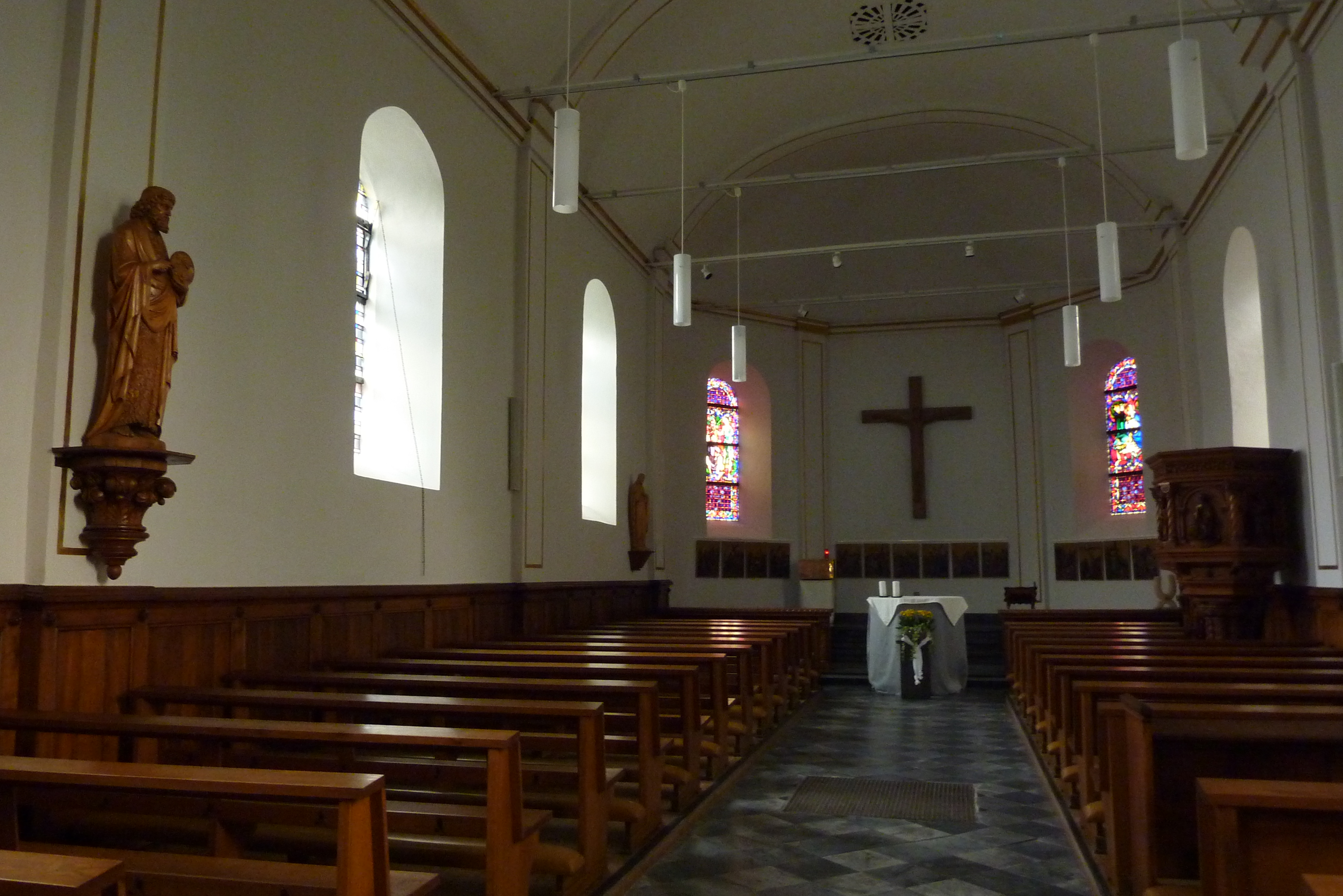 Bergkapelle, Kapelle St. Johannes, in Eupen (Provinz Lüttich in der Wallonischen Region in Belgien)